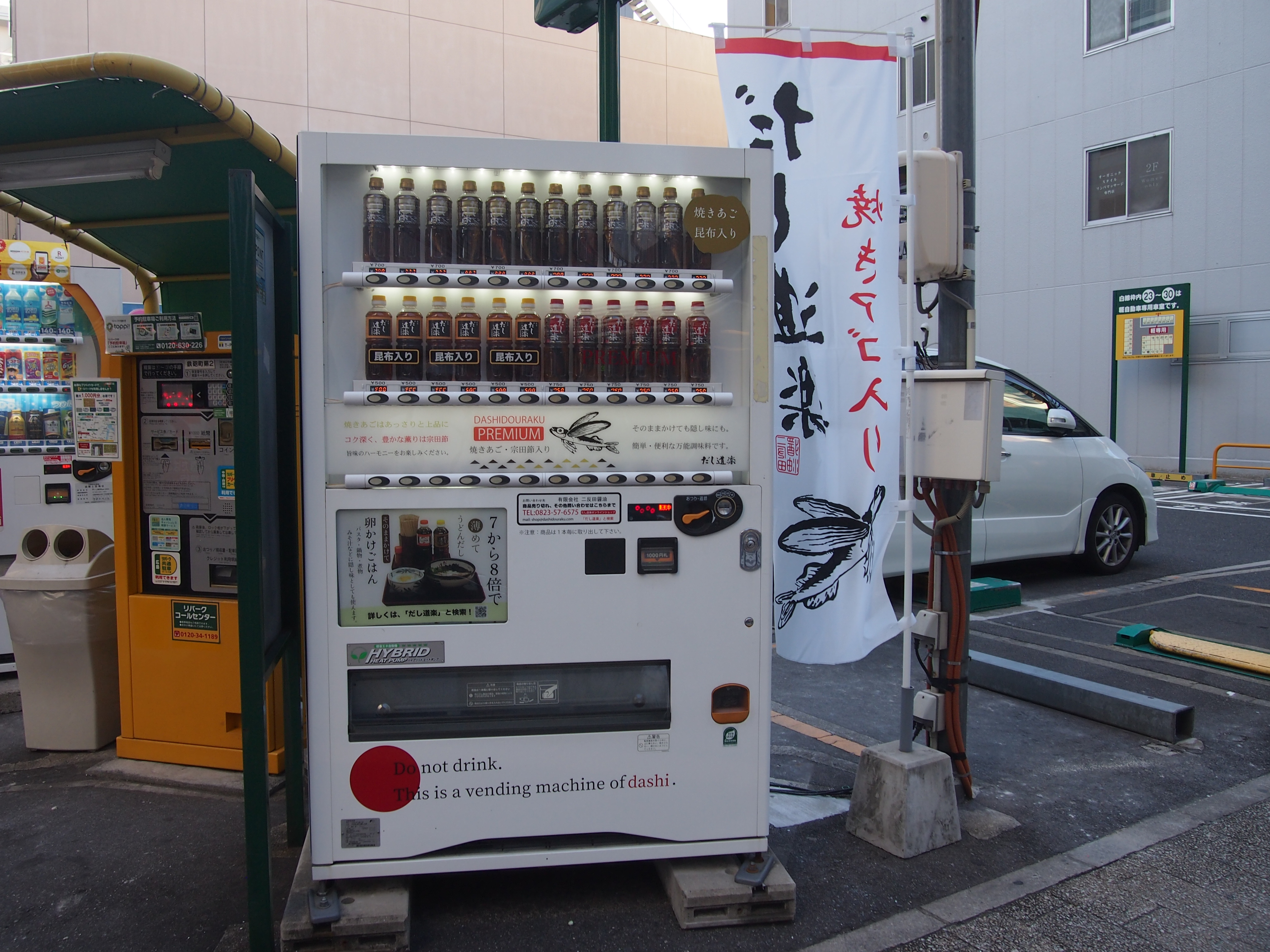 だし道楽 自販機